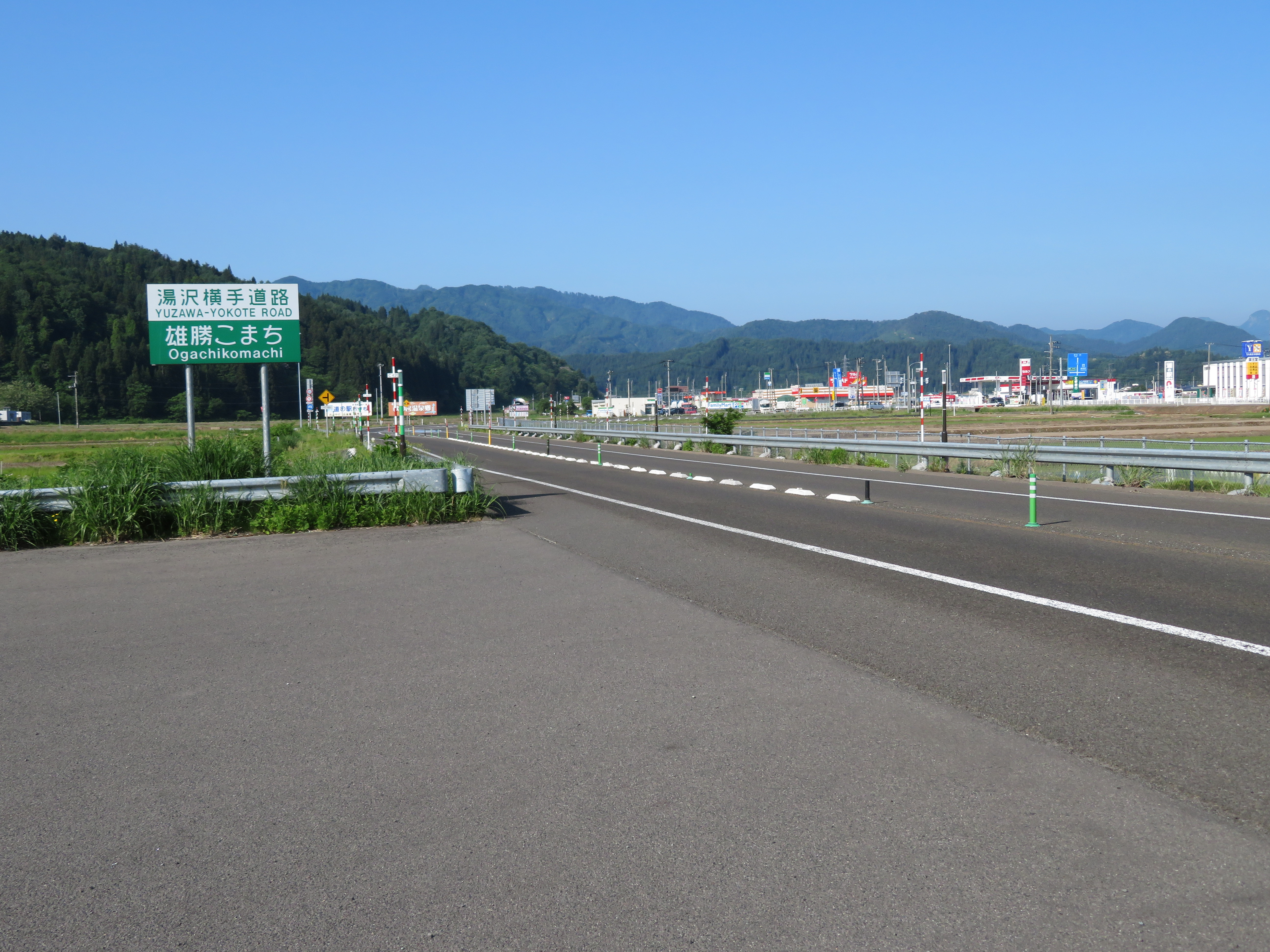 湯沢横手道路雄勝こまちIC出入口付近 Canon PowerShot SX720 HS